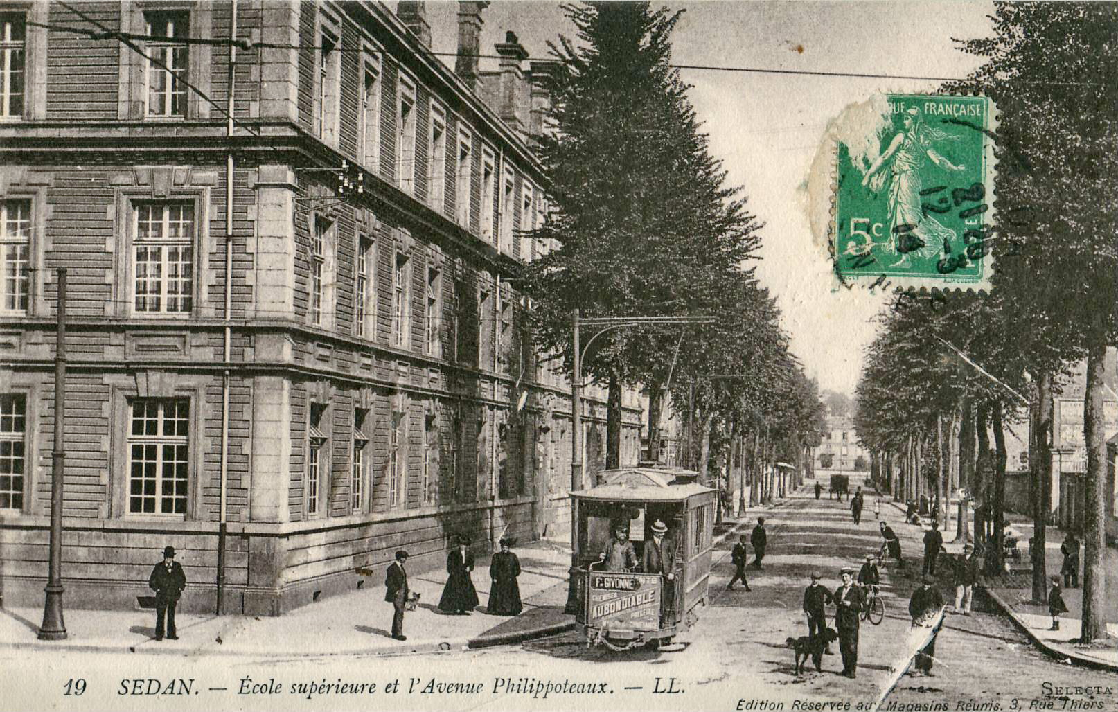 Carte postale ancienne éditée par LL, n°19 (édition réservée aux Magasins réunis & SELECTA) :SEDAN Ecole supérieure et Avenue Philippoteaux